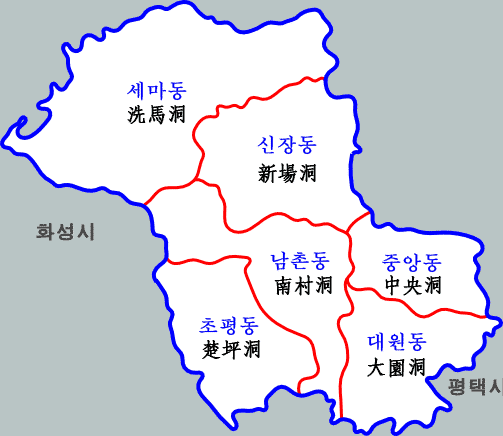 오산시 세부 행정 지도